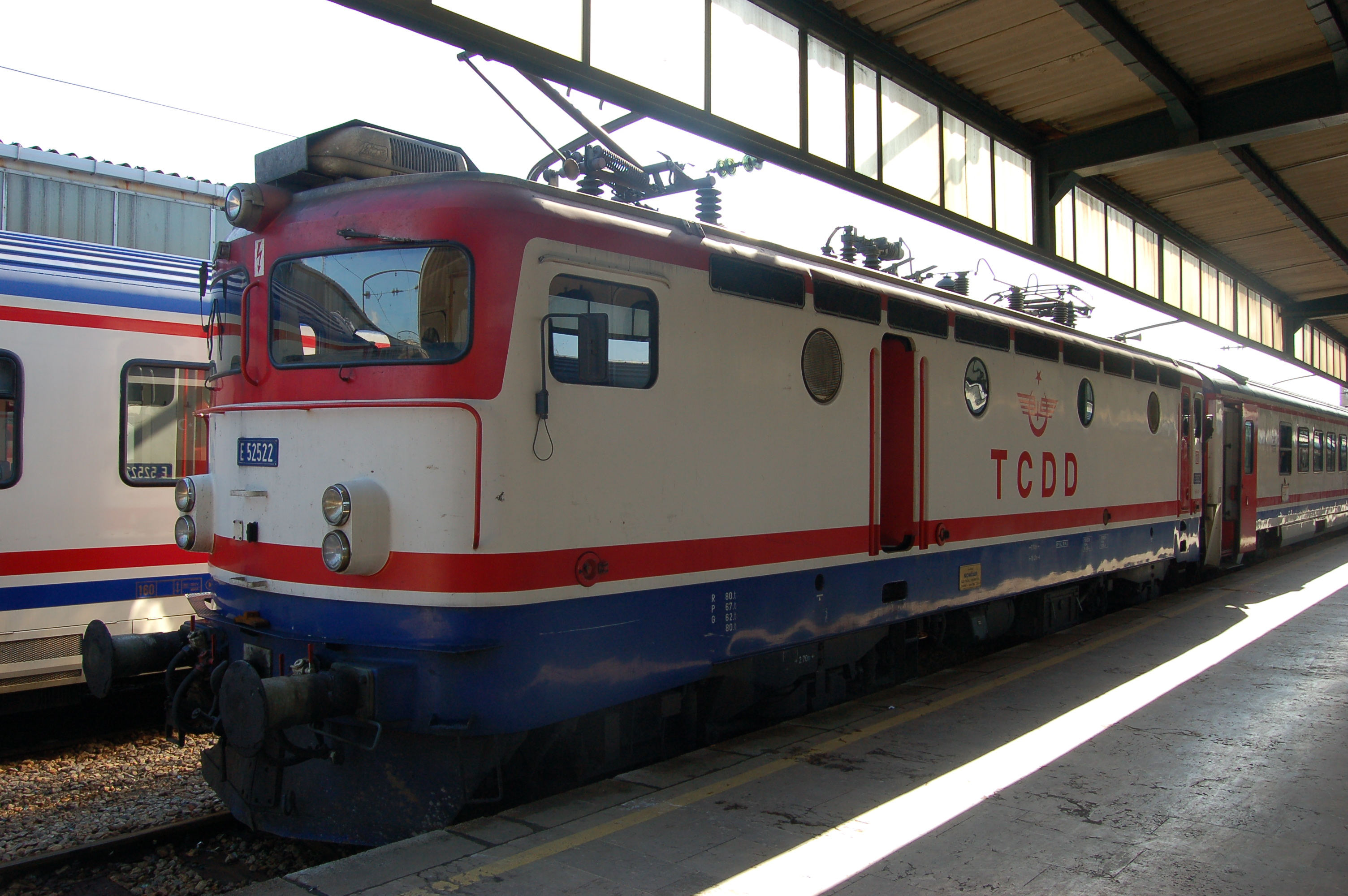 TCDD E52522 at Hyderpasa, Istanbul, Turkey